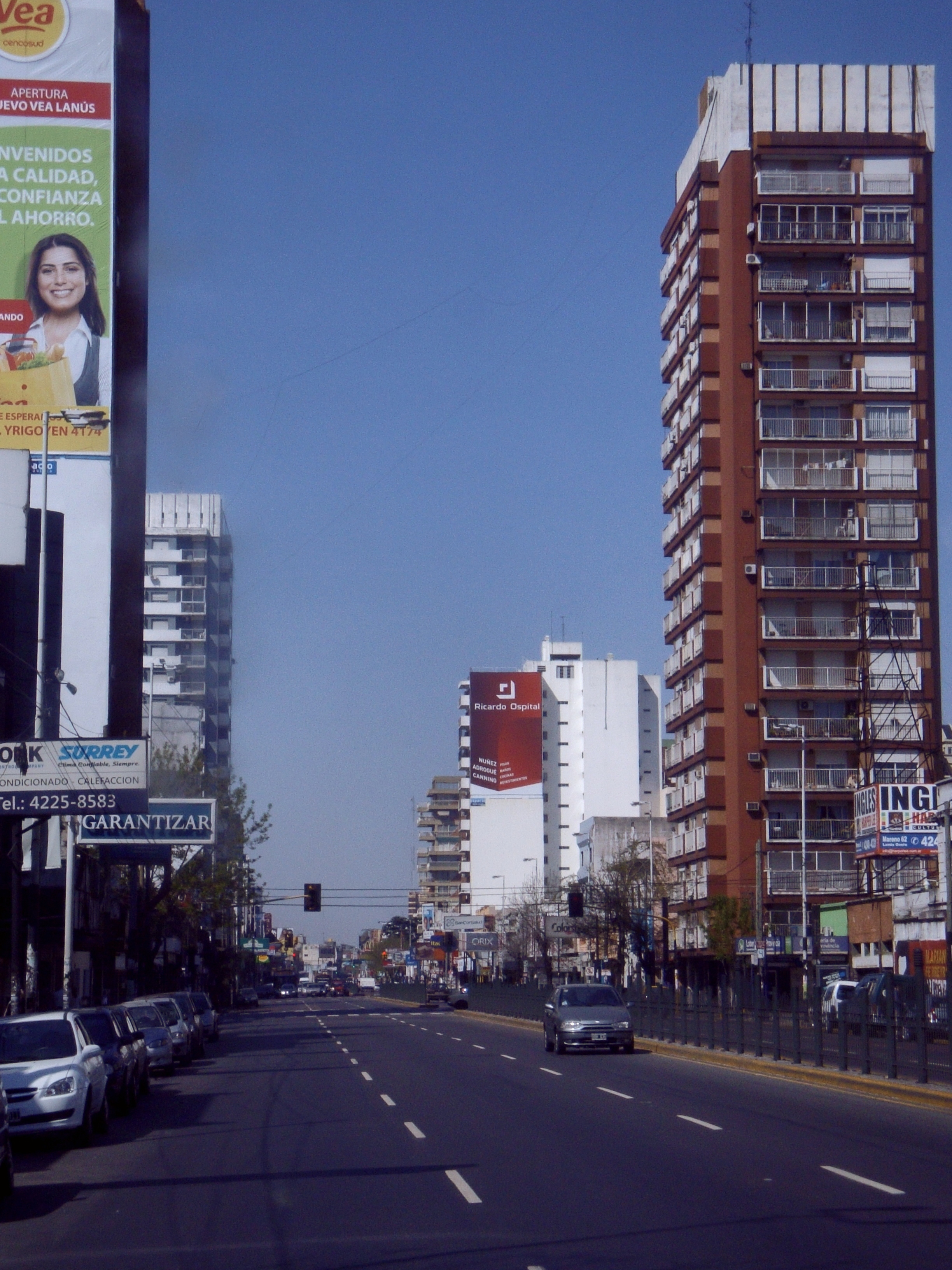 La avenida Hipólito Yrigoyen a la altura de Lanús.